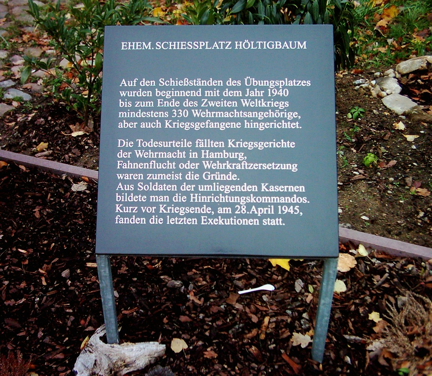 Tafel des ehemaligen Schießplatzes Höltigbaum, Hamburg-Rahlstedt, Gewerbegebiet Höltigbaum.